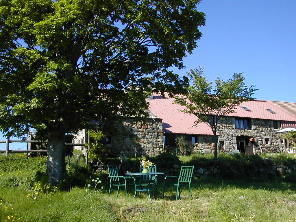 Maison en pierre du Plateau Ardéchois, Brin d'Air - Chambres et Table d'Hôtes